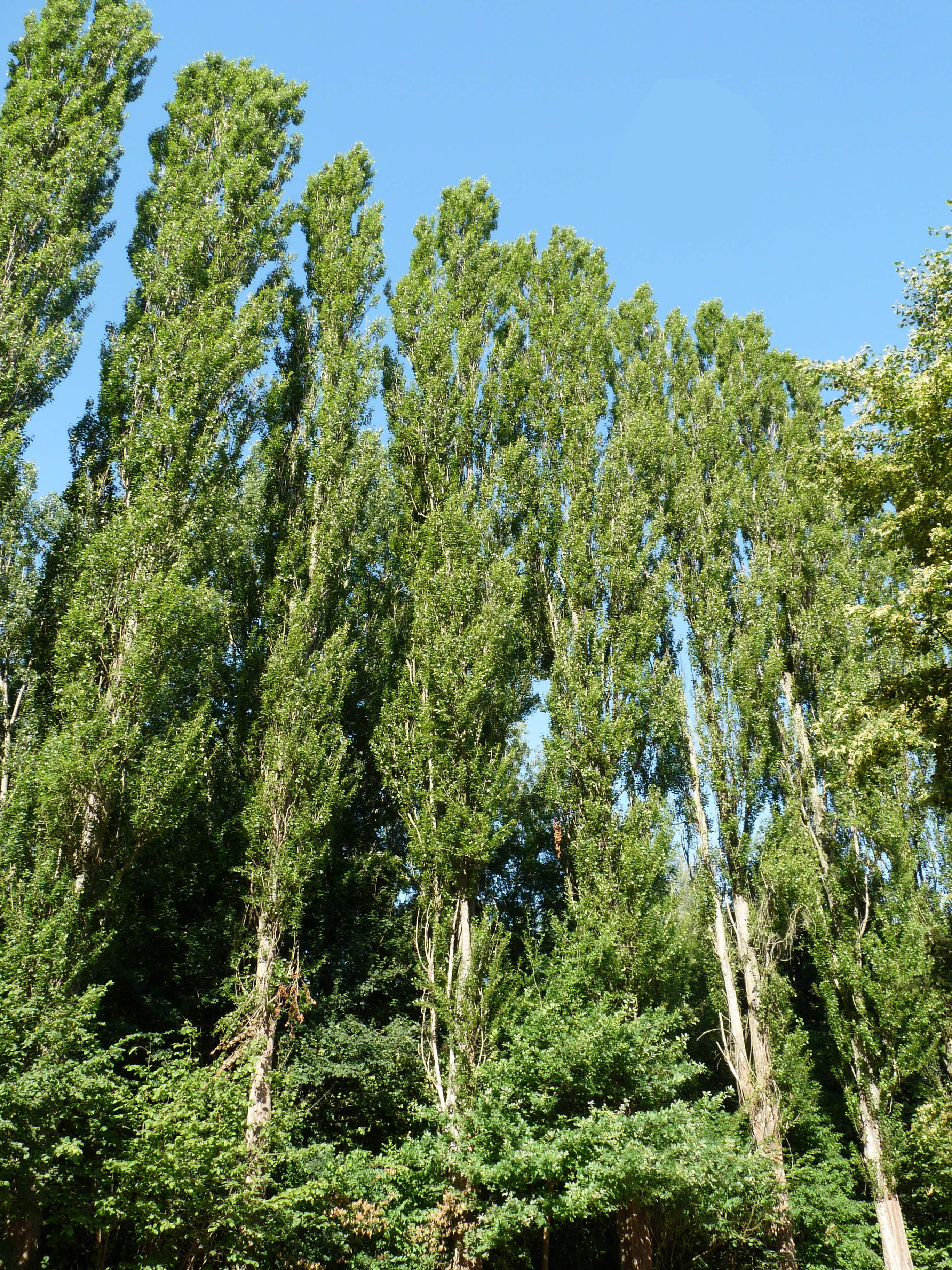 Peupliers dans la forêt de la Robertsau, au nord de Strasbourg